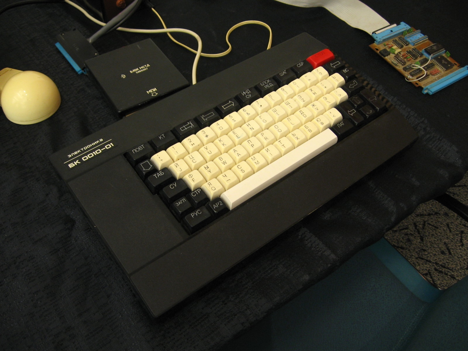 Elektronika BK 0010-01